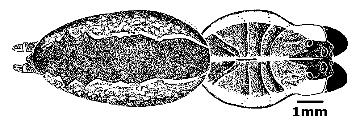 Sosippus mexicanus, female from Acapulco de Juarez, Guerrero, Mexico, 1 Sep. 1940.